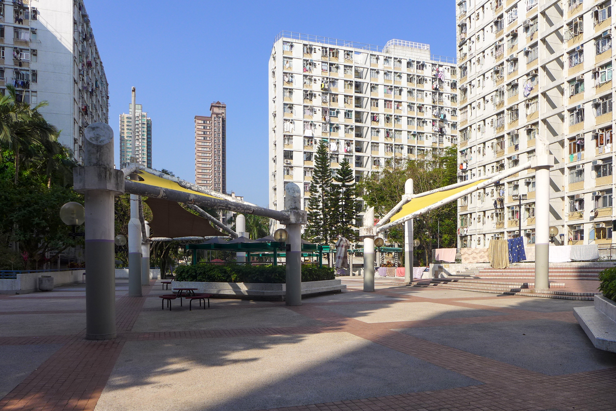 Nam Cheong Estate